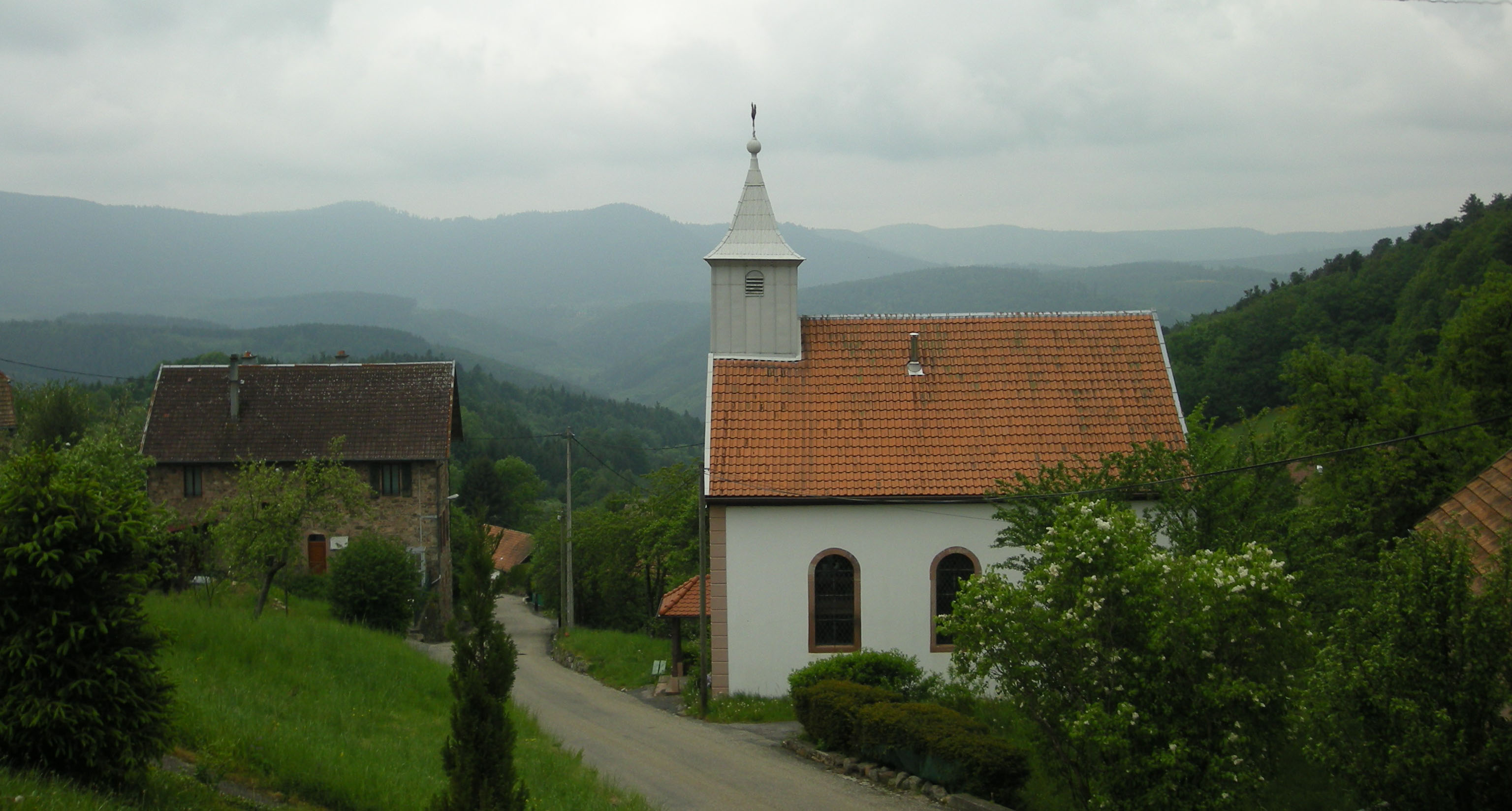 Eglise à Solbach (Bas-Rhin)